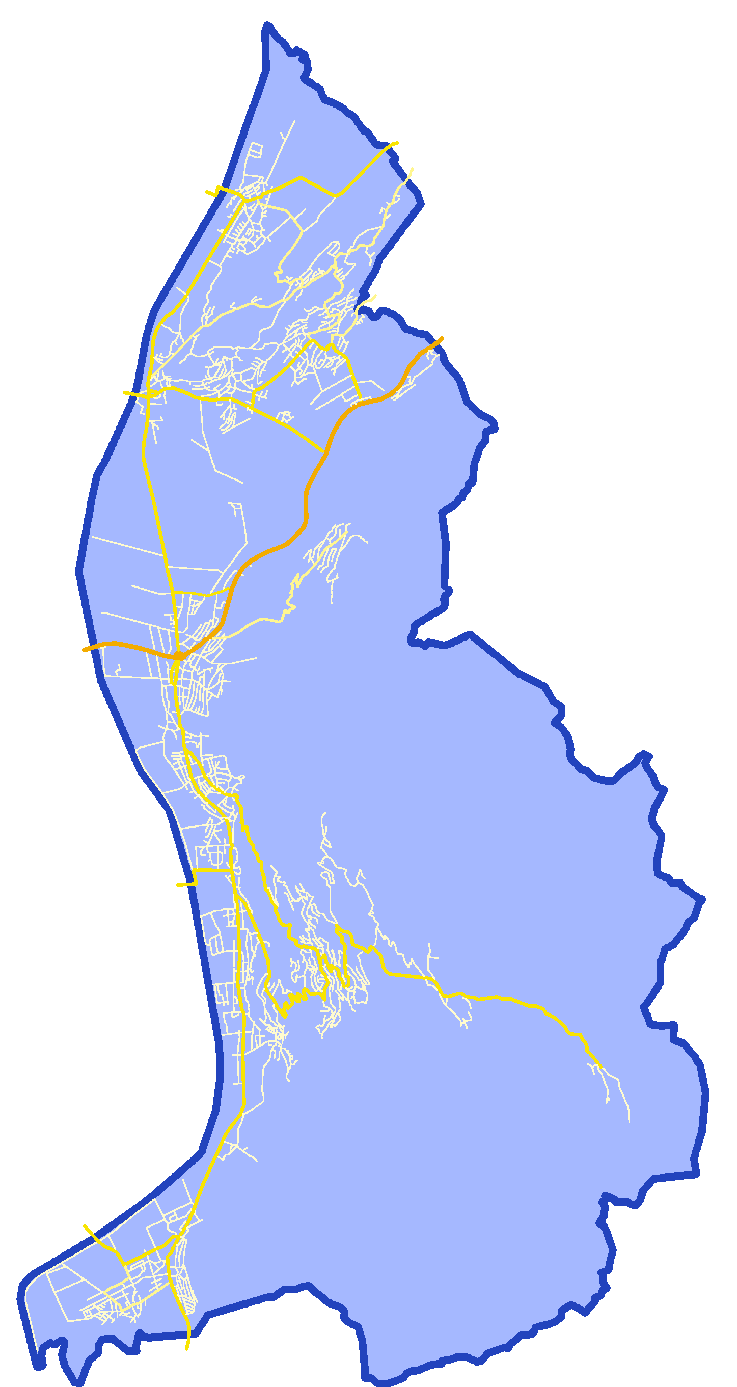 Map of Liechtenstein road network (2020)